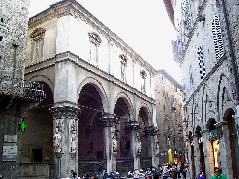 Siena - Loggia della Mercanzia